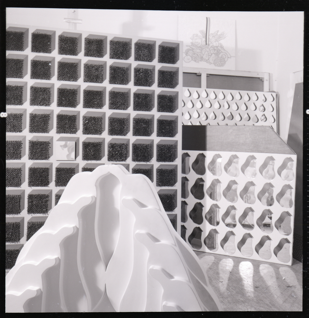 Servizio fotografico : Bologna, 1969 / Paolo Monti. - Buste: 19, Fototipi: 20 : Negativo b/n, gelatina bromuro d'argento/ pellicola ; 6x6. - ((Serie costituita da 20 negativi identificati con i nn.: 14843-14861. La suddetta serie è contenuta nella scatola identificata con la numerazione 14501-15000G. - Occasione: Documentazione opere di Concetto Pozzati per la Galleria Dè Foscherari. - Fonte: Fattura di Paolo Monti: IV. Commesse/ Fattura (1969/03/05), presso Archivio Paolo Monti